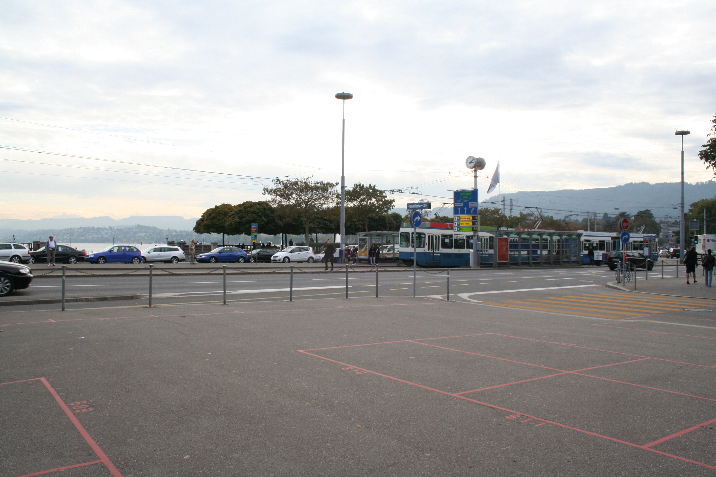 Bürkliplatz in Zürich